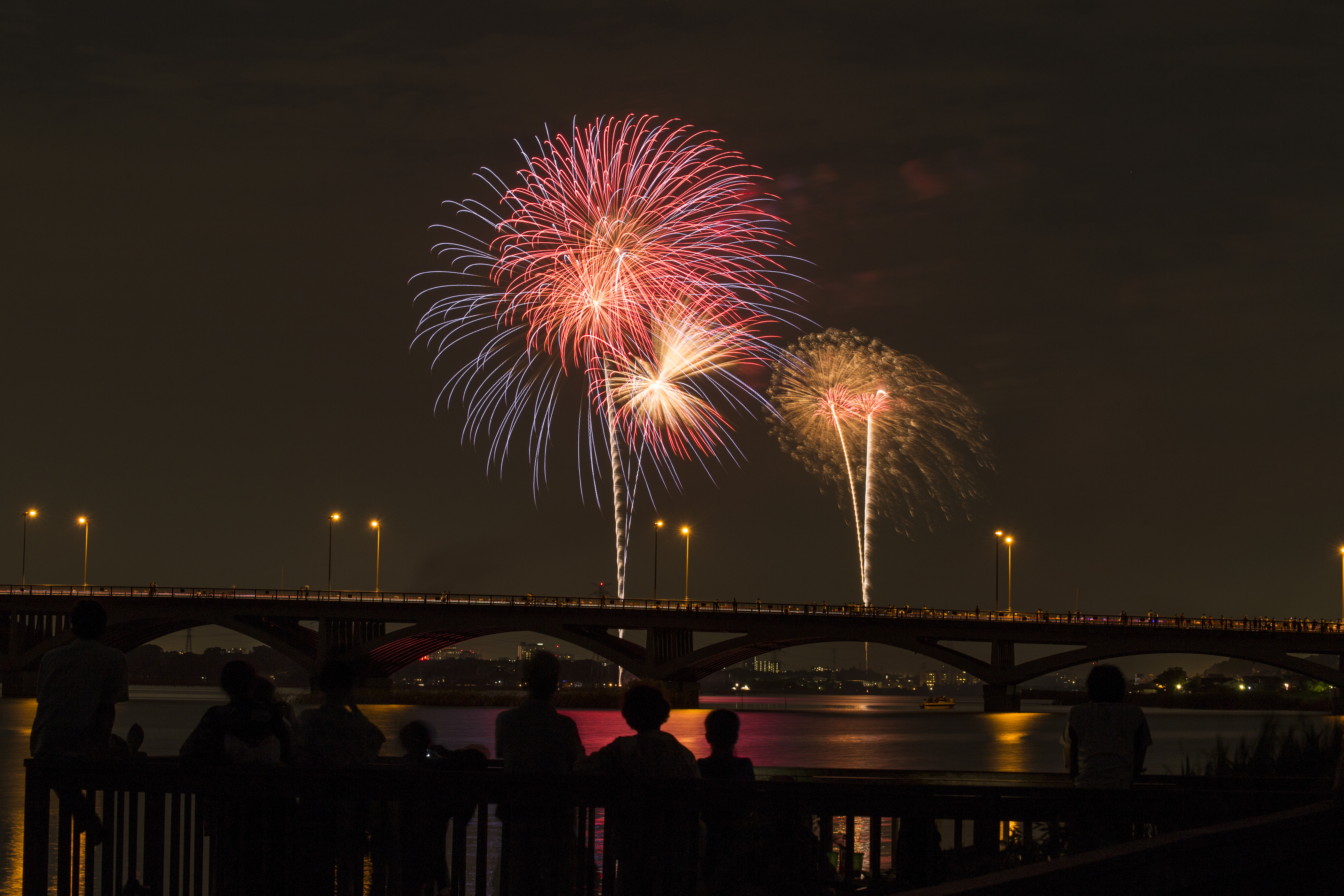 2014手賀沼花火大会pt2（CC-BY-2.0 で Flickrにアップロードされていた画像）